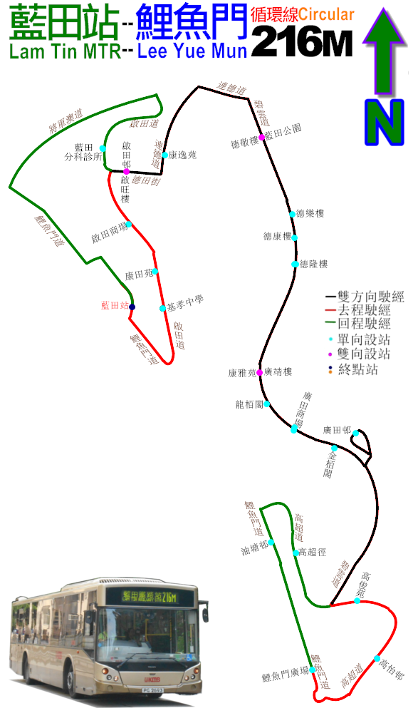 中文（香港）: 九巴216M線的走線圖